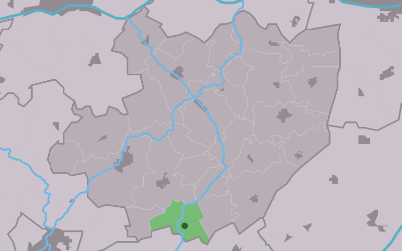 Kaartsje fan himrik fan Reahûs